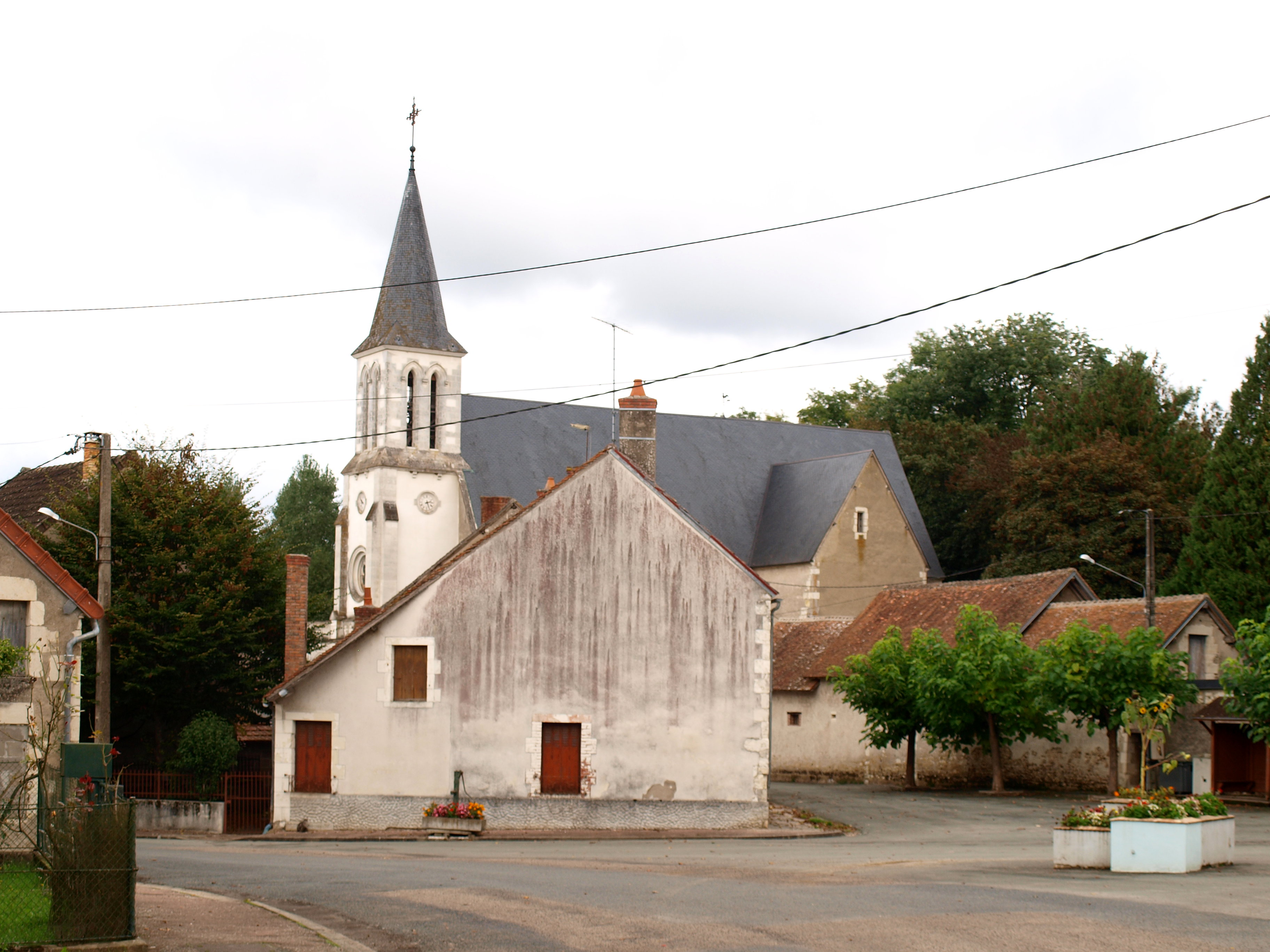 Annay (Nièvre, France) , l'église Sainte-Anne & le village.